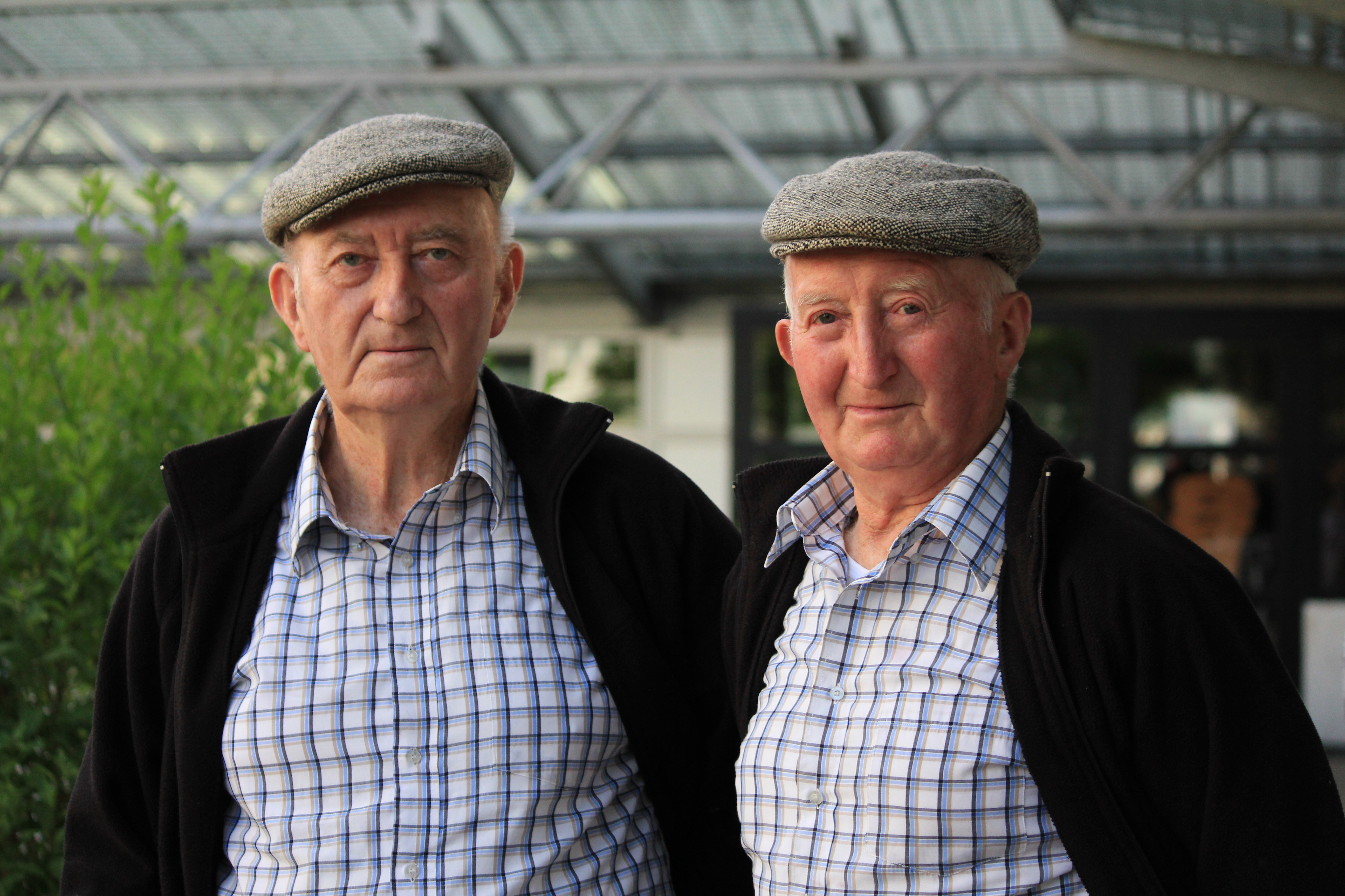 Les Frères Morvan (Yvon à gauche, Henri à droite), lors du festival interceltique de Lorient 2013